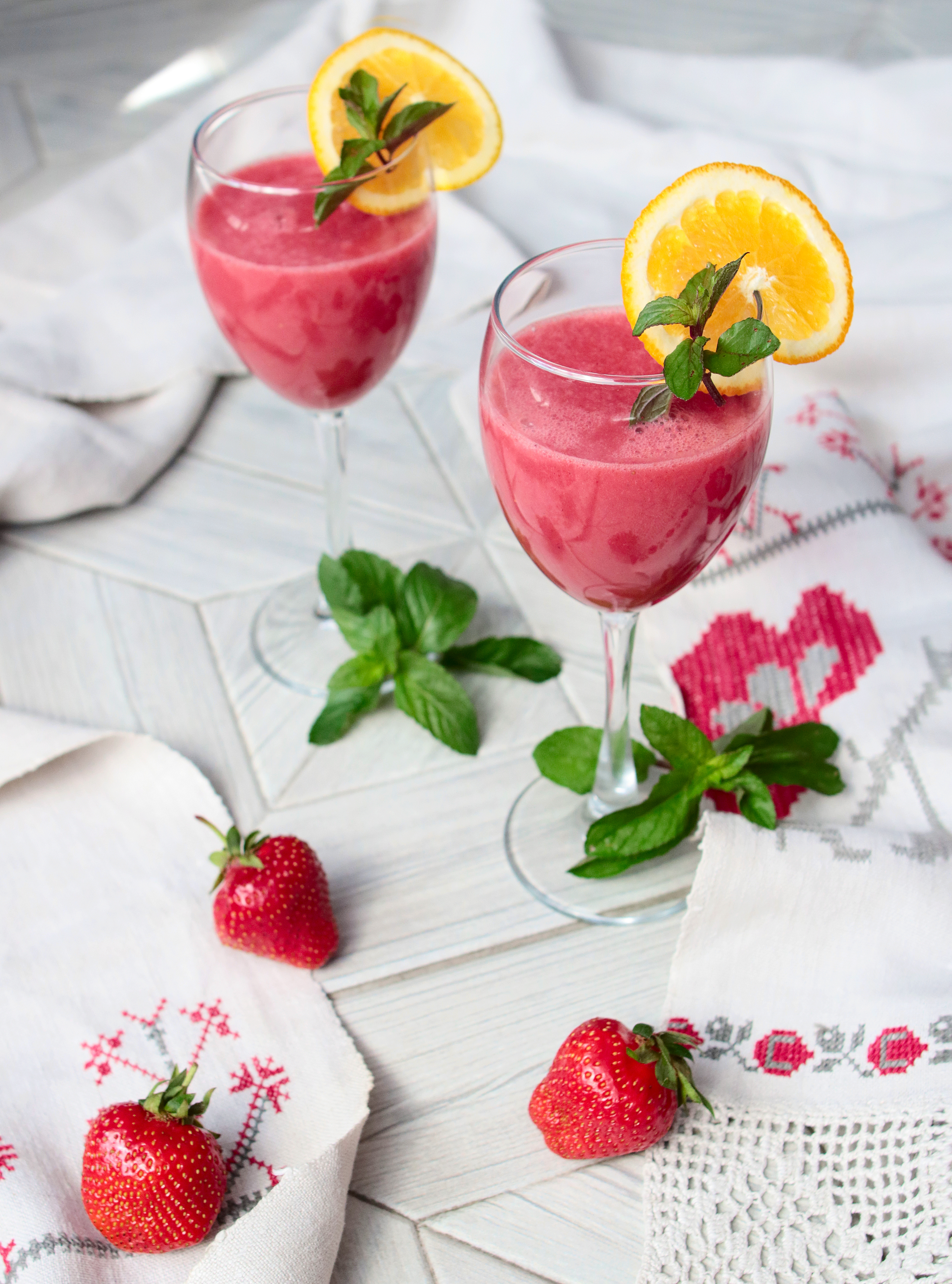 Современная белорусская кулага, блюдо из ягод, пшеничной муки, мёда. This photo has been taken in the country: Belarus